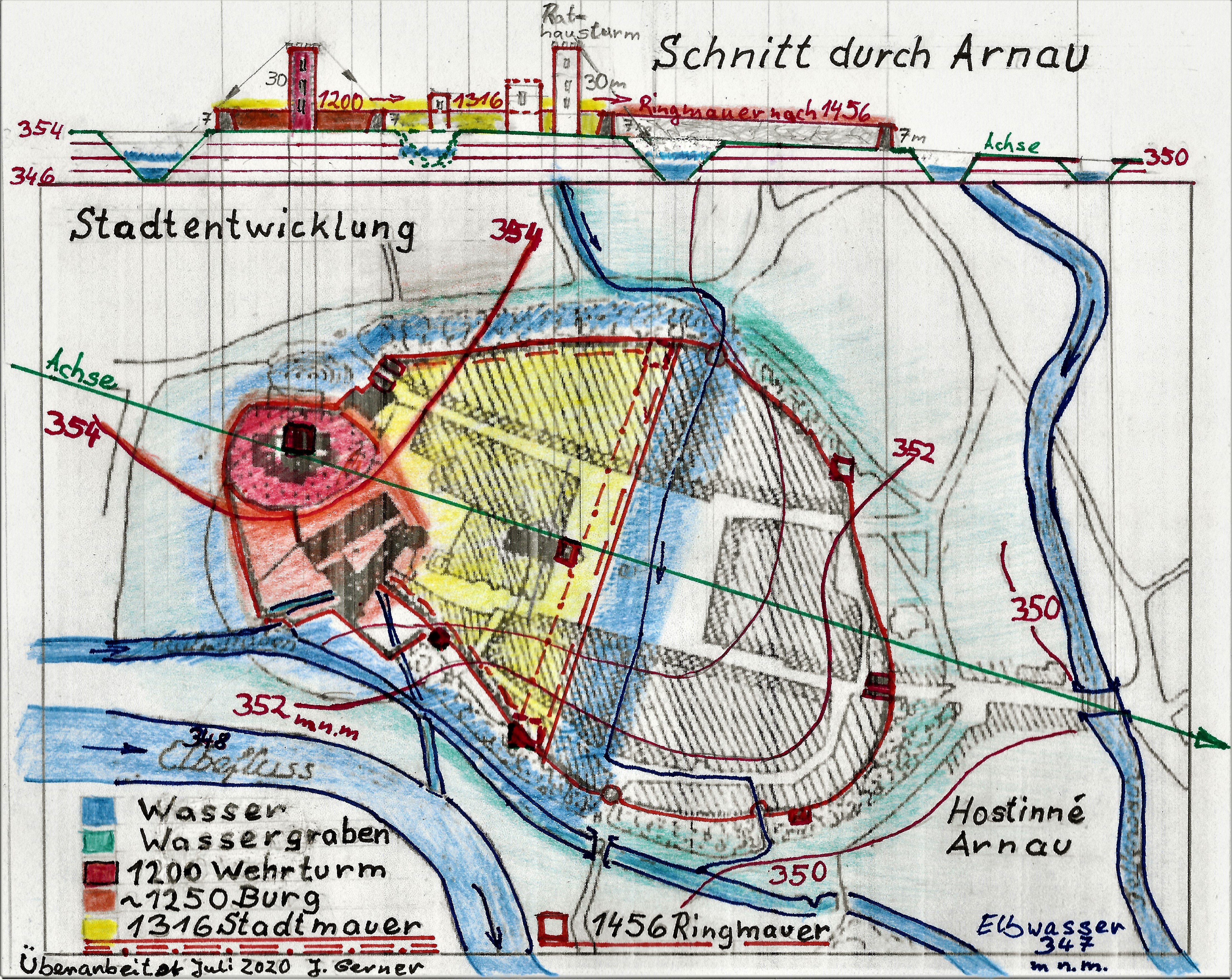 Die Draufsicht und der Schnitt durch Arnau zeigt die Höhen der Wasserstände um und innerhalb der Stadtbefestigung in verschiedenen Zeiten an. Wehrmauern und Türme sind im selben Größenverhältnis dargestellt.